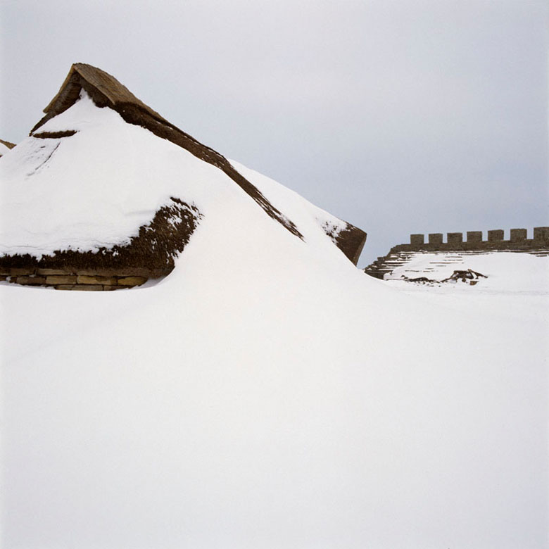 Borgen i snö Motiv: Eketorps borg Nyckelord: Raä-Fastigheter, Riksintressen, Vintermotiv, Världsarv Kategori: Fornborg Borgen i snö.